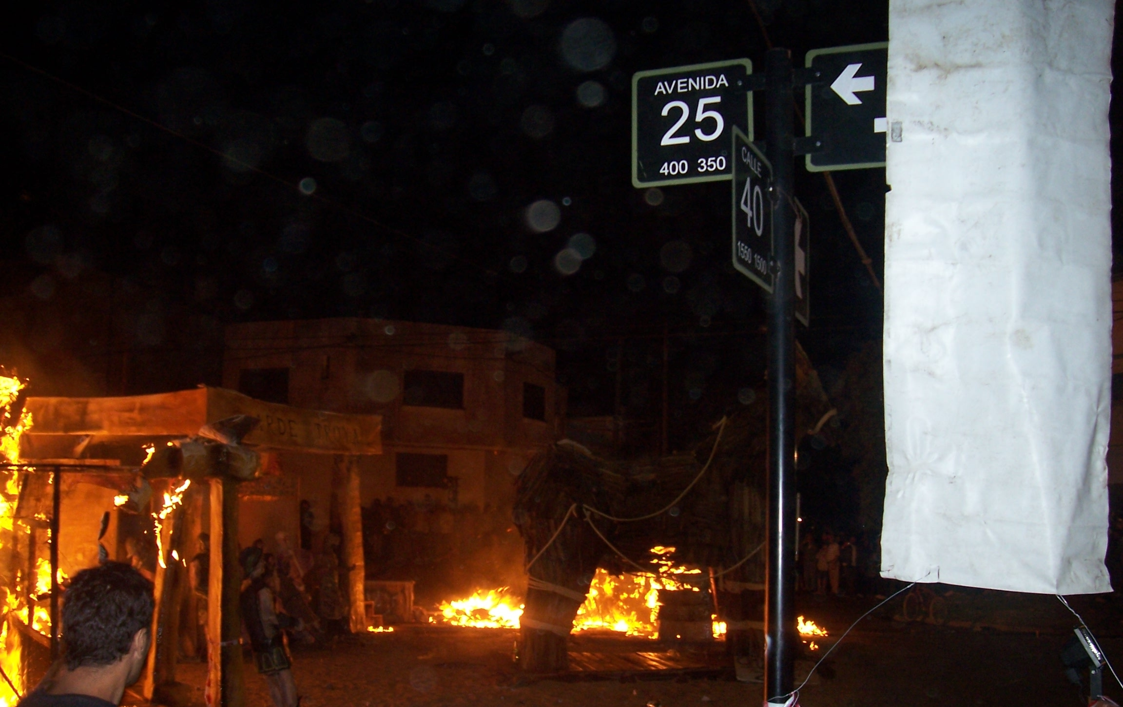 Tradicional quema del muñeco en la ciudad de La Plata. Imagen del muñeco ganador, llamado "Arde Troya".